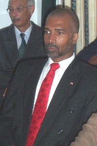 Romeo van Russel.